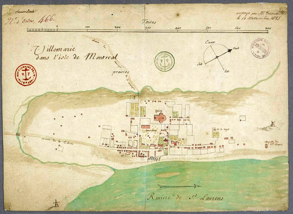 Ville-Marie dans l'isle de Montréal - Dessin à la plume aquarellé sur papier 24,2 x 33,2 - Echelle 28 cm pour 700 toises